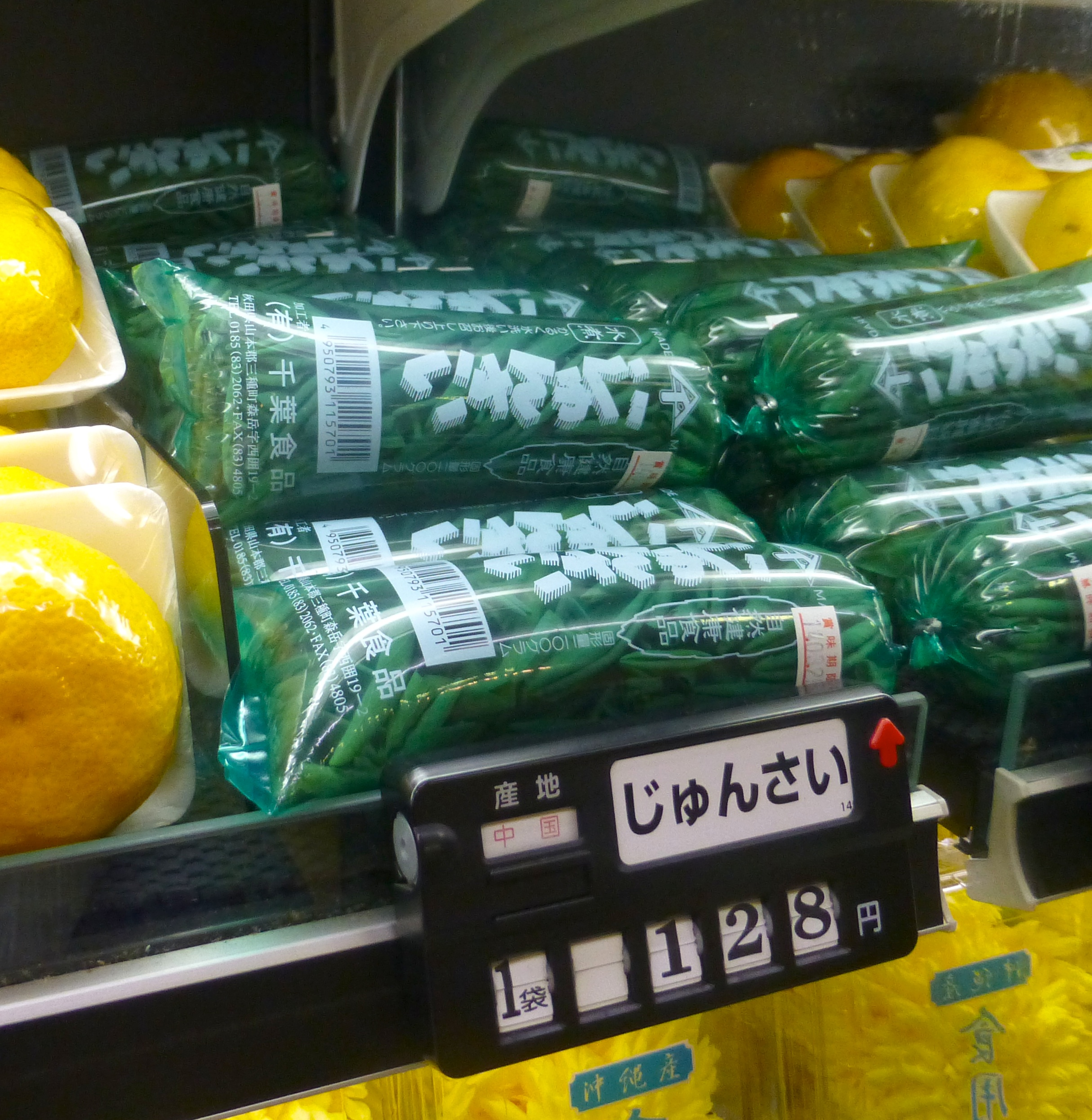 ジュンサイ (junsai)